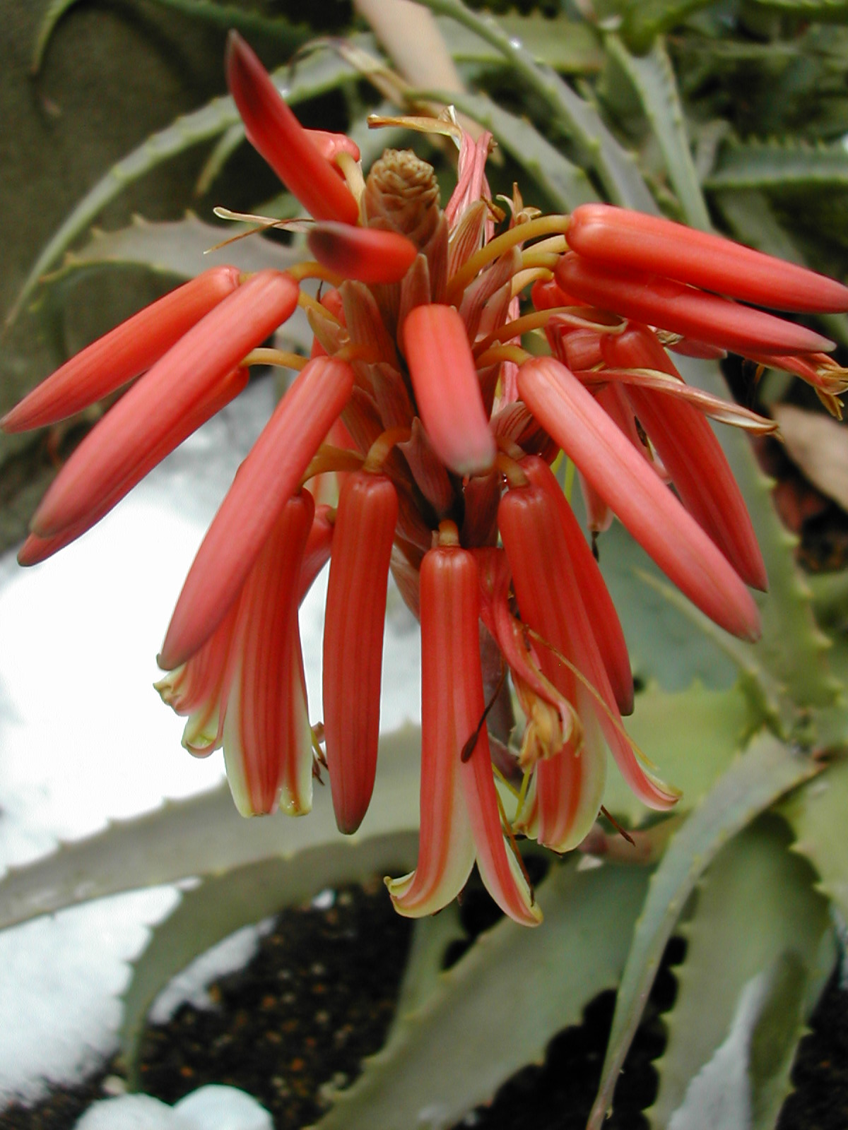 Imuzakが撮影したキダチアロエの花の写真.